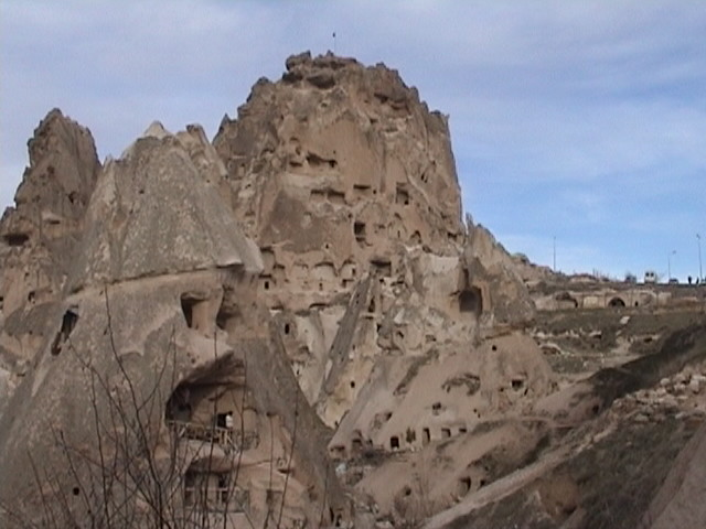 Habitations troglodytiques - Üçhisar, Cappadoce, Turquie.